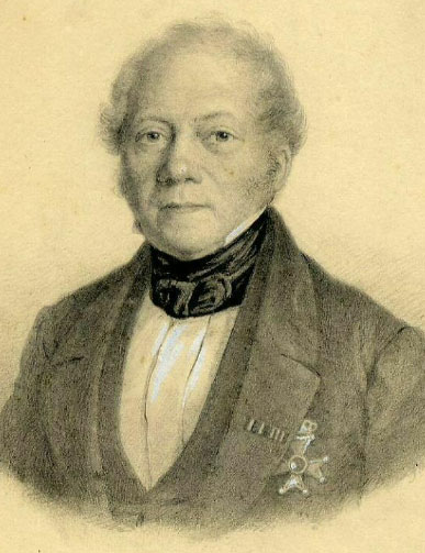 Portret van Frans Alexander van Rappard (1793-1867)